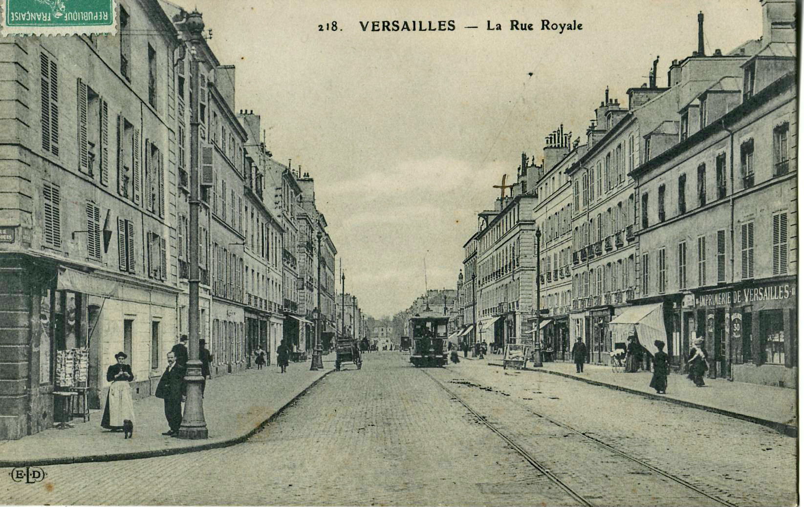 Carte postale ancienne éditée par ELD, n° 218 : VERSAILLES - La rue Royale.Vue d'une motrice du tramway de Versailles